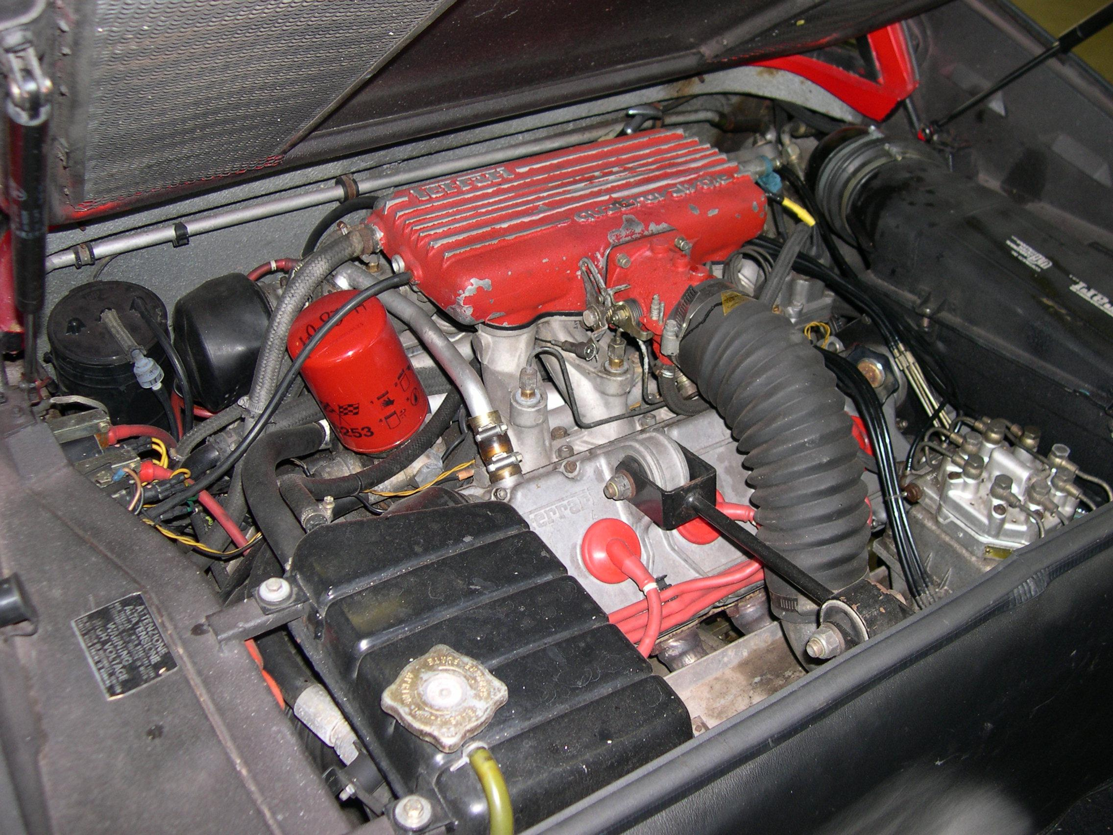 3.0 L Quattrovalvole V8 engine in a 1984 Ferrari 308 GTB, European-spec